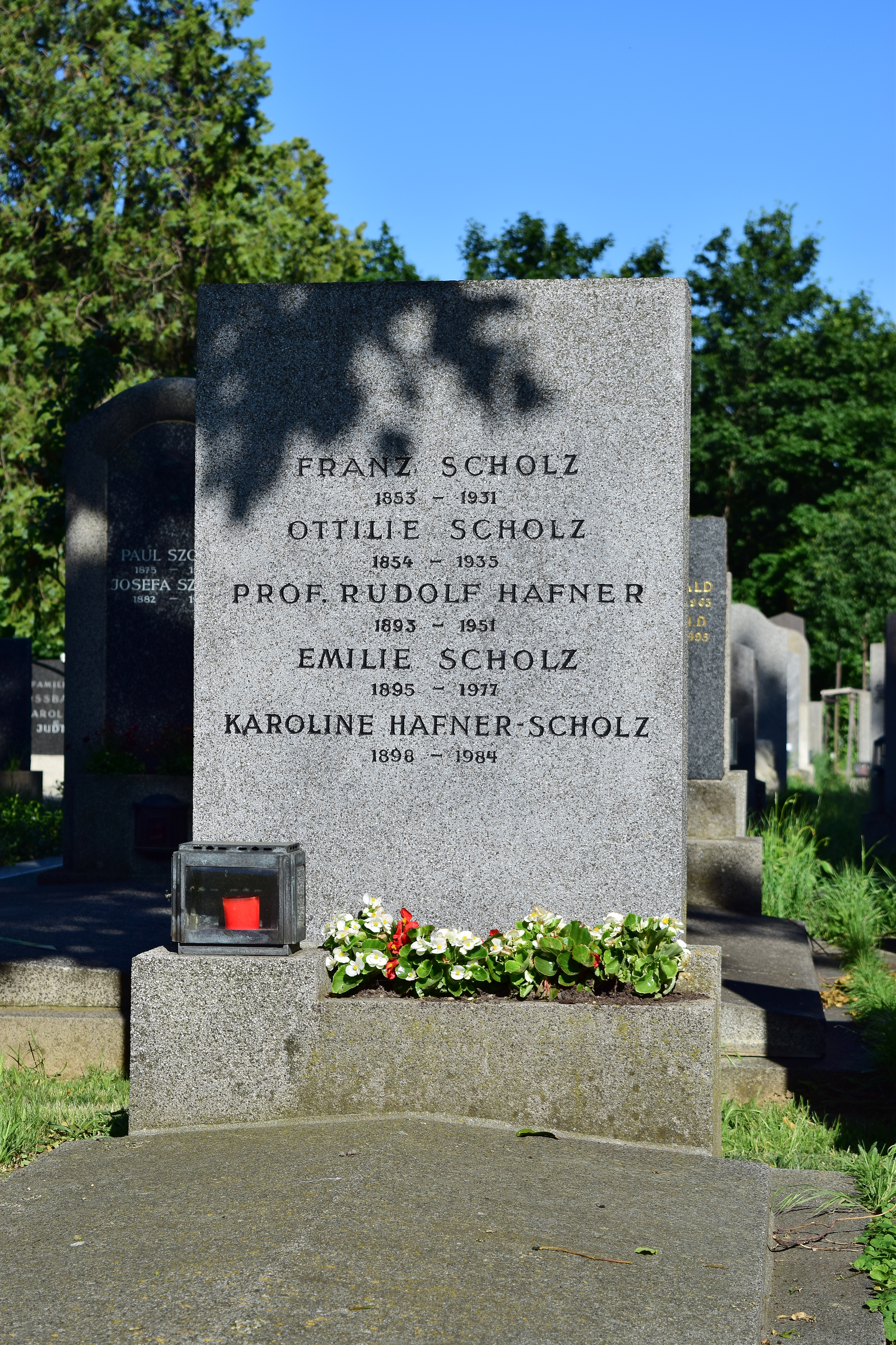 Ehrenhalber gewidmetes Grab von Rudolf Hafner (Maler) auf dem evangelischen Friedhof im Wiener Zentralfriedhof